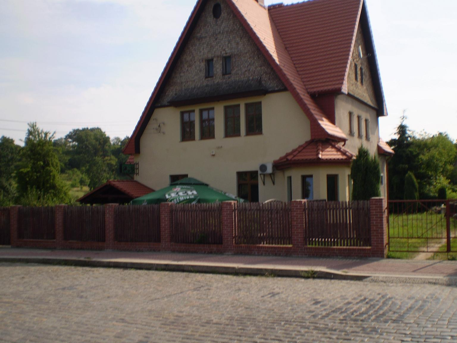 Budynek pogotowia ratunkowego w Gubinie